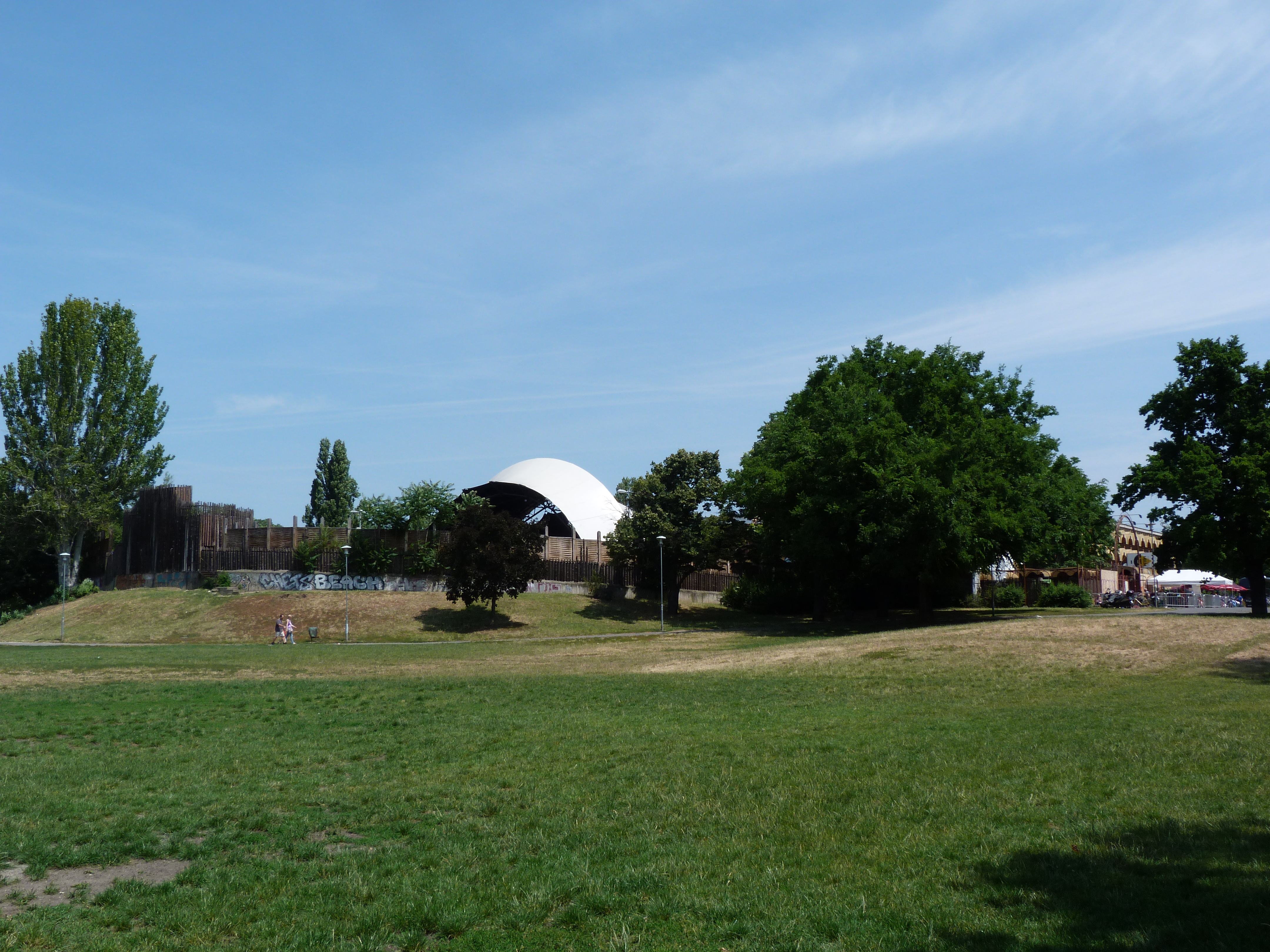 A felvétel 2014. június 28-án szombaton készült Budapesten, a PECSA-nál (Petőfi Csarnok, Petőfi Music Hall). Bolhapiac. .